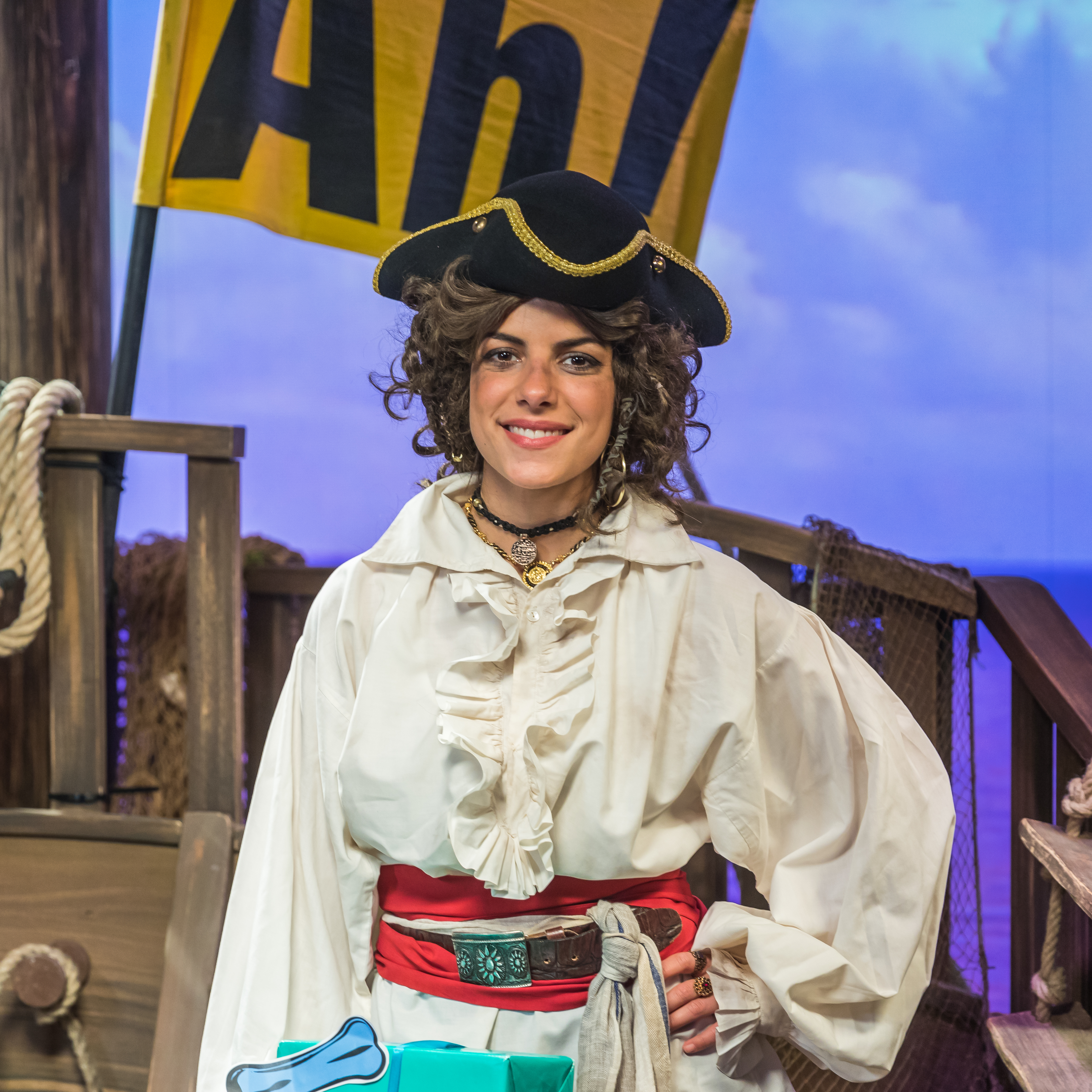 Wissen macht Ah! - Pressetermin im Studio in Köln-Bocklemünd Foto: Clarissa Corrêa da Silva als Piratin in der Kulisse der Sendung